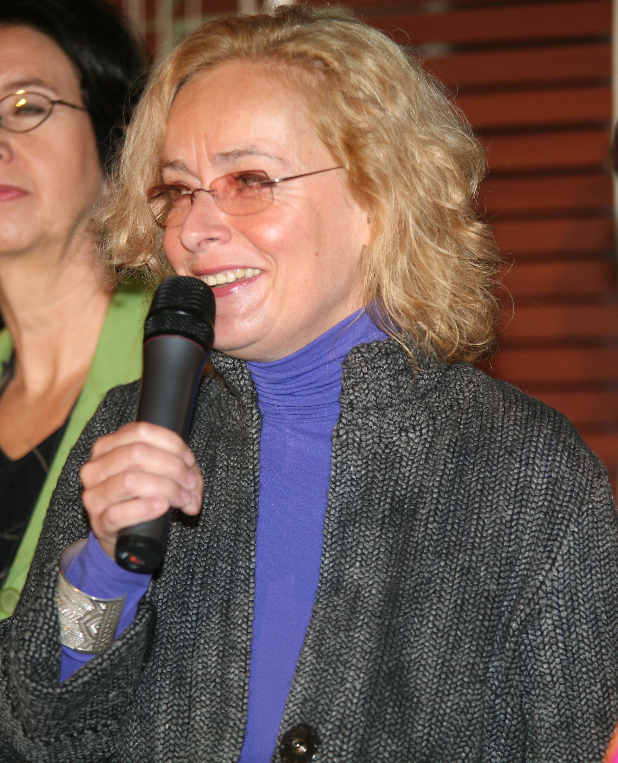 Gertraud Knoll. Kandidatin für die Nationalratswahl 2008.